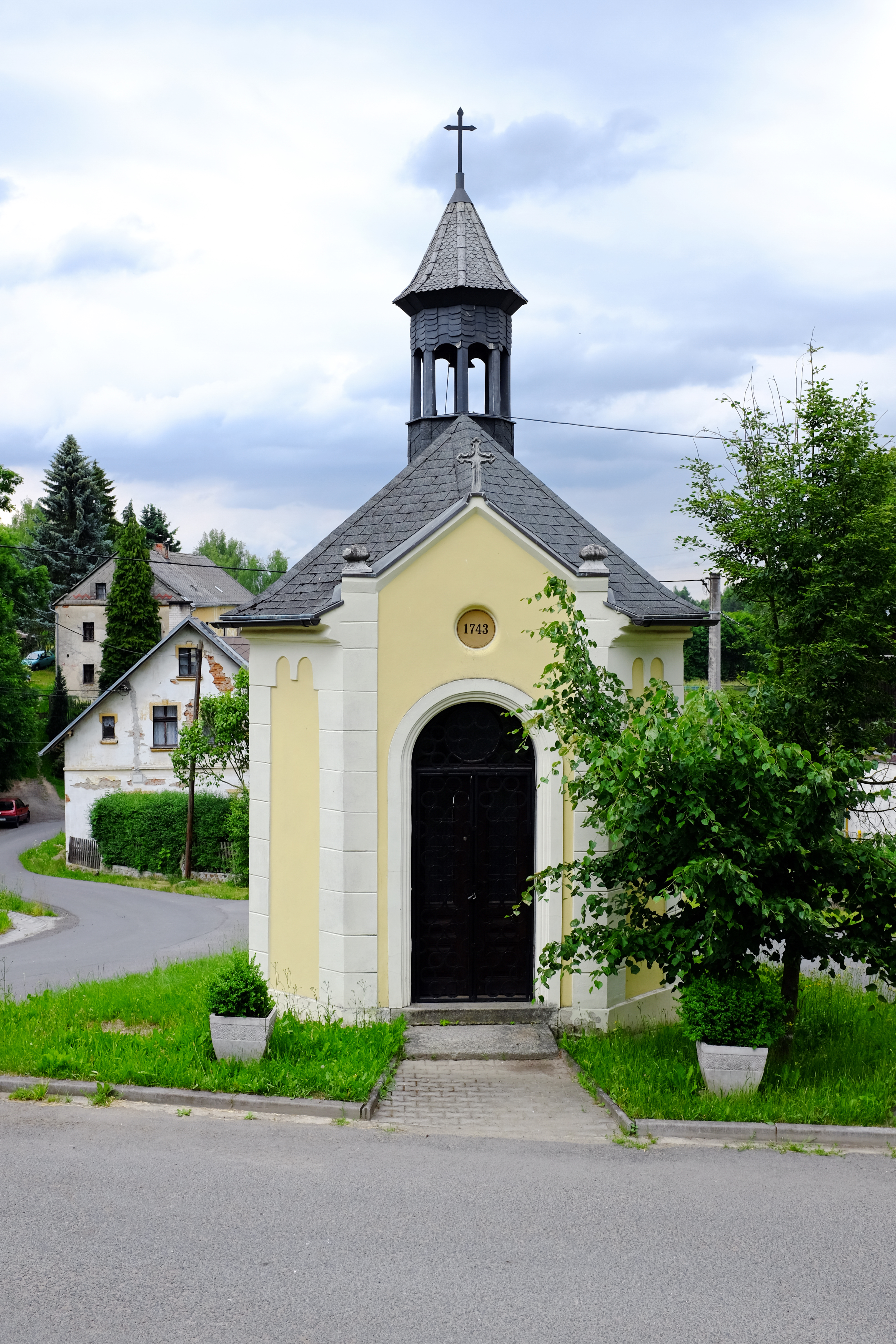 Kaple svatého Jana Nepomuckého, náves, Ležnice, Horní Slavkov, Horní Slavkov.